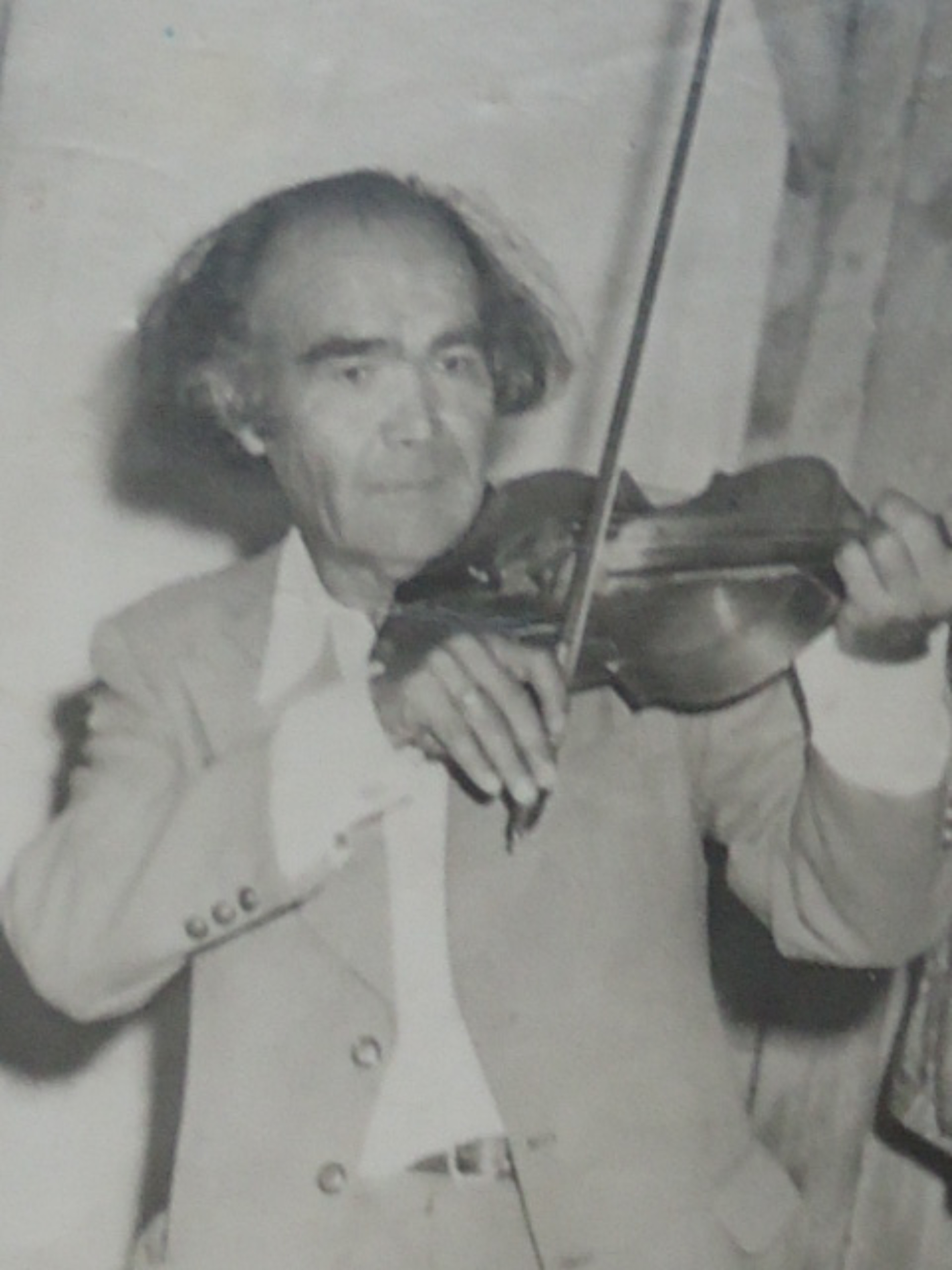 Башҡортса: Сөләймәнов Әһлей Фазлый улы, һәүәҫкәр скрипкасы һәм ҡурайсы.